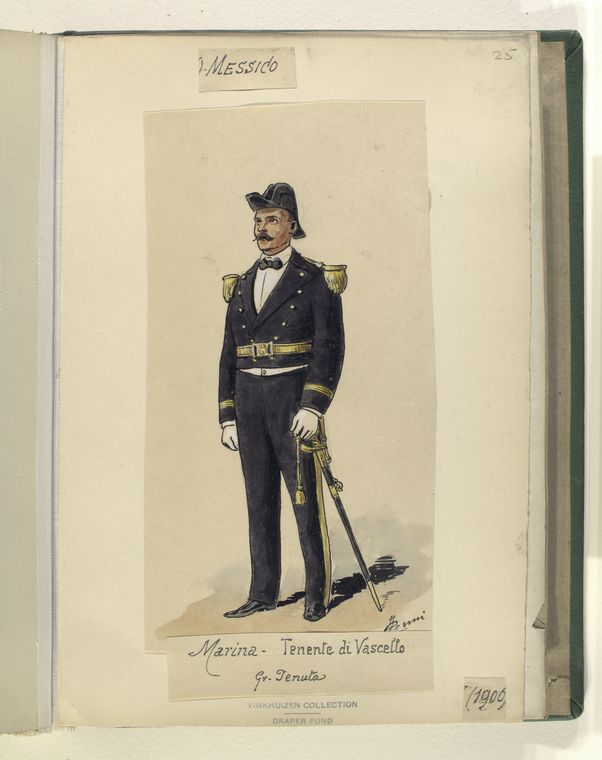 uniforme de lieutenant de vaisseau de la marine mexicaine (grande tenue) en 1906